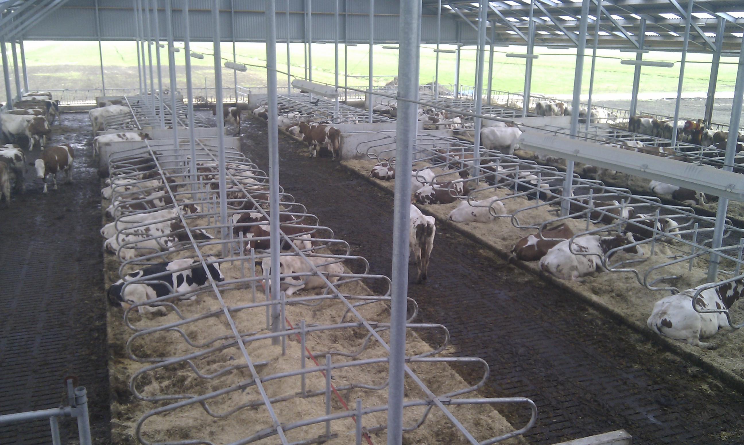 De biologische melkveestal van Boer Bert in Woerden.